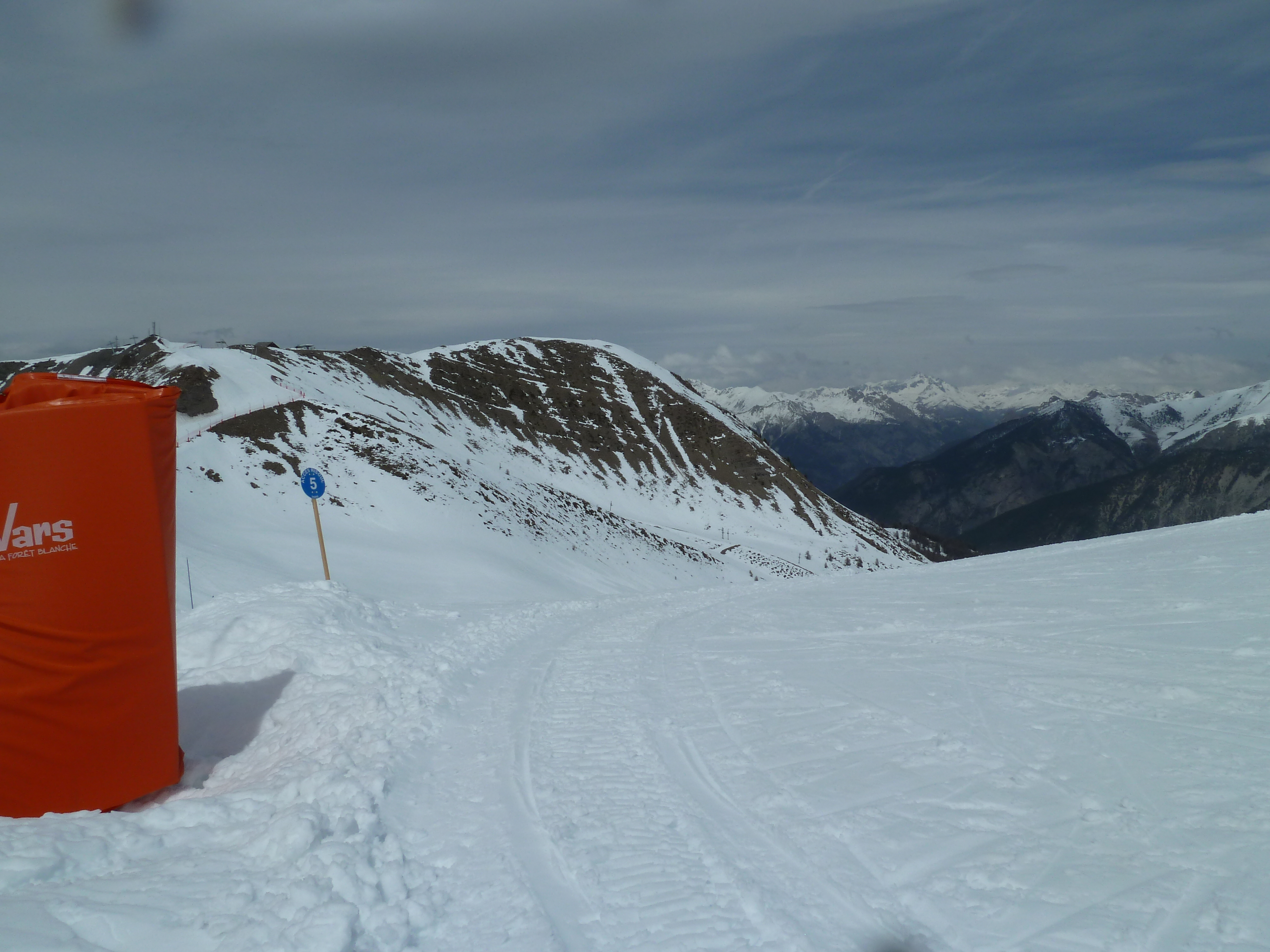 La piste bleue de ski d'accès au domaine de Risoul depuis Vars dans le domaine de la Forêt Blanche à Vars